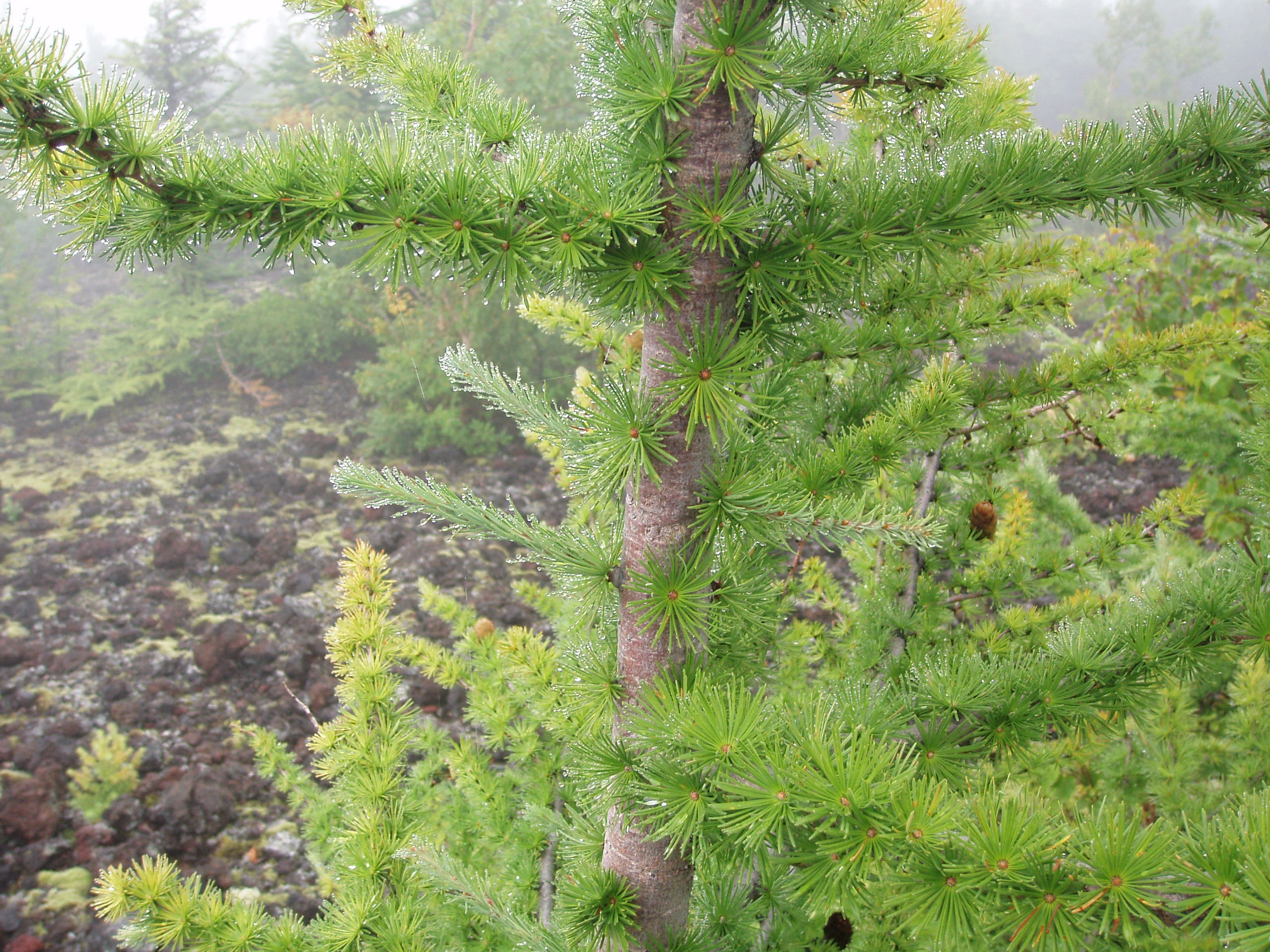 カラマツの幹